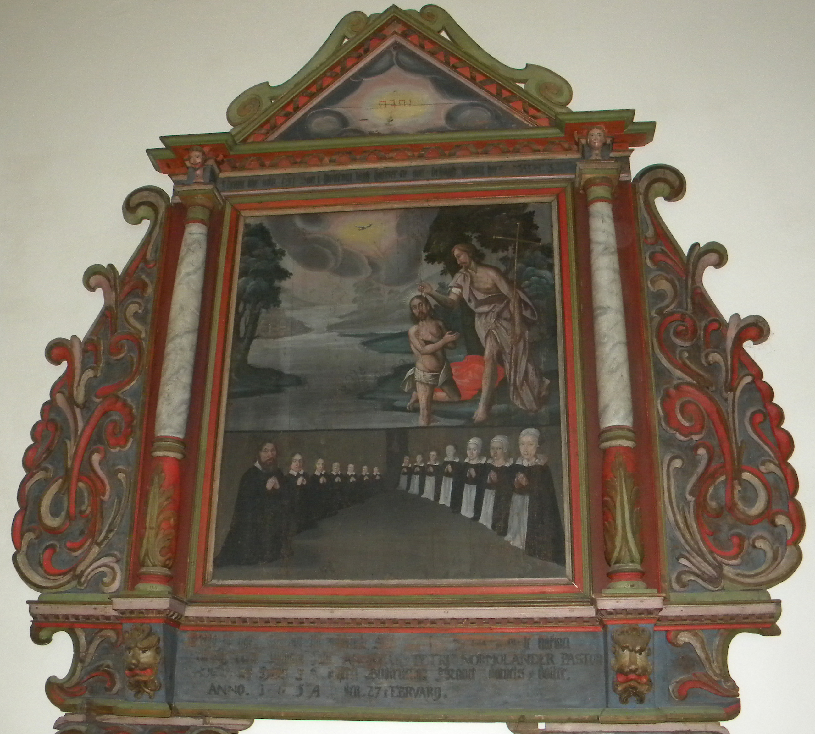 Högby kyrka - Epitafium från 1700-talet med tetragrammet JHWH högst upp i triangeln